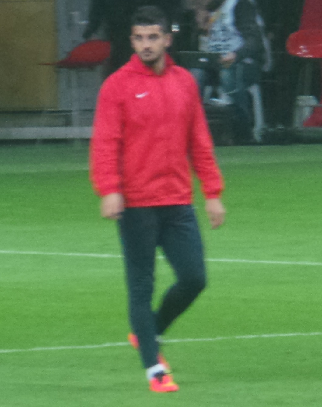 Efe Halil Özarslan